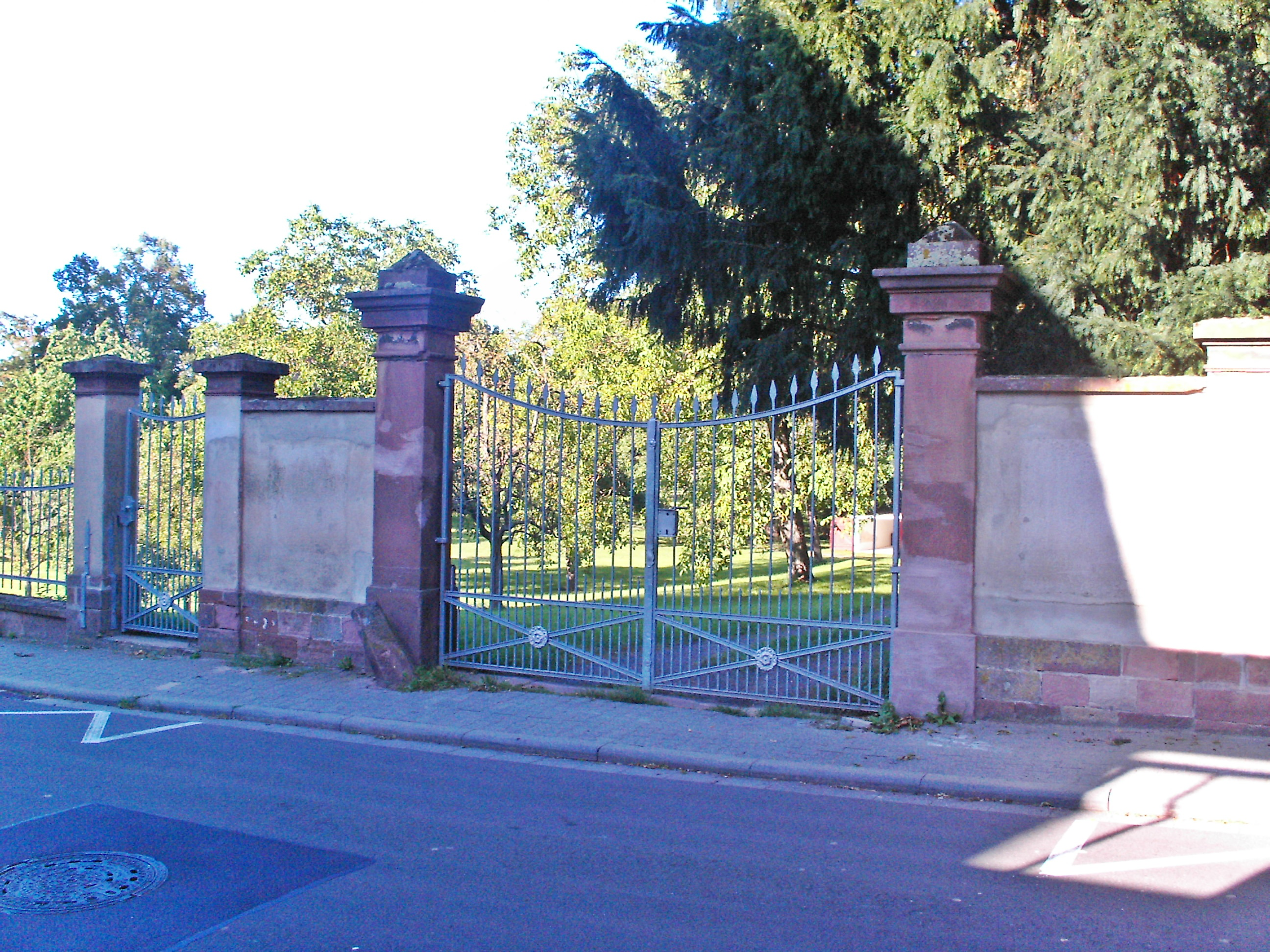 Eingang Schlosspark Heidesheim in Obrigheim (Pfalz), Rheinland-Pfalz. Das Schloss des gräflichen Hauses Leiningen-Heidesheim wurde 1794 durch Truppen der Französischen Revolution niedergebrannt.